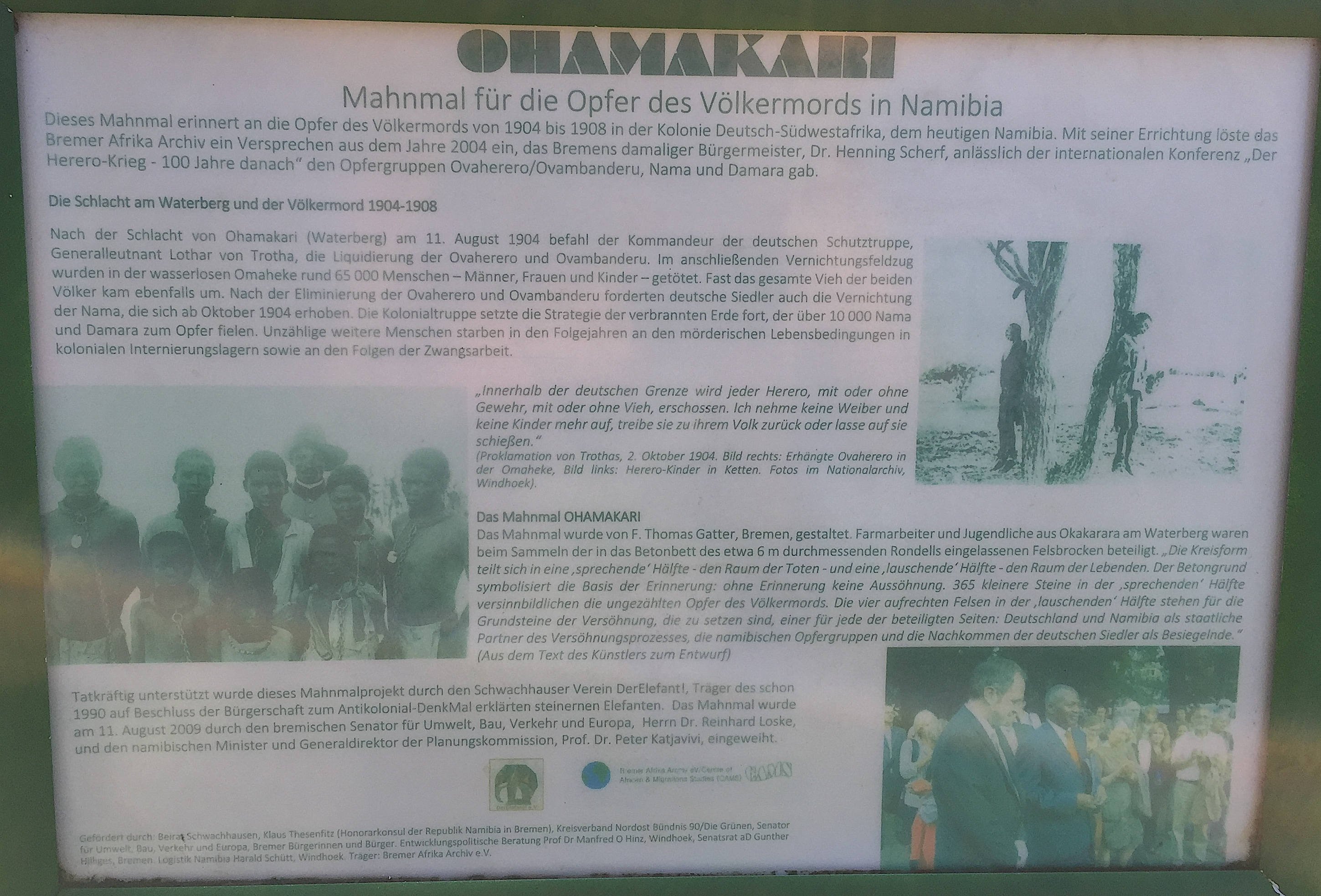 Zeigt die Tafel neben dem Mahnmal